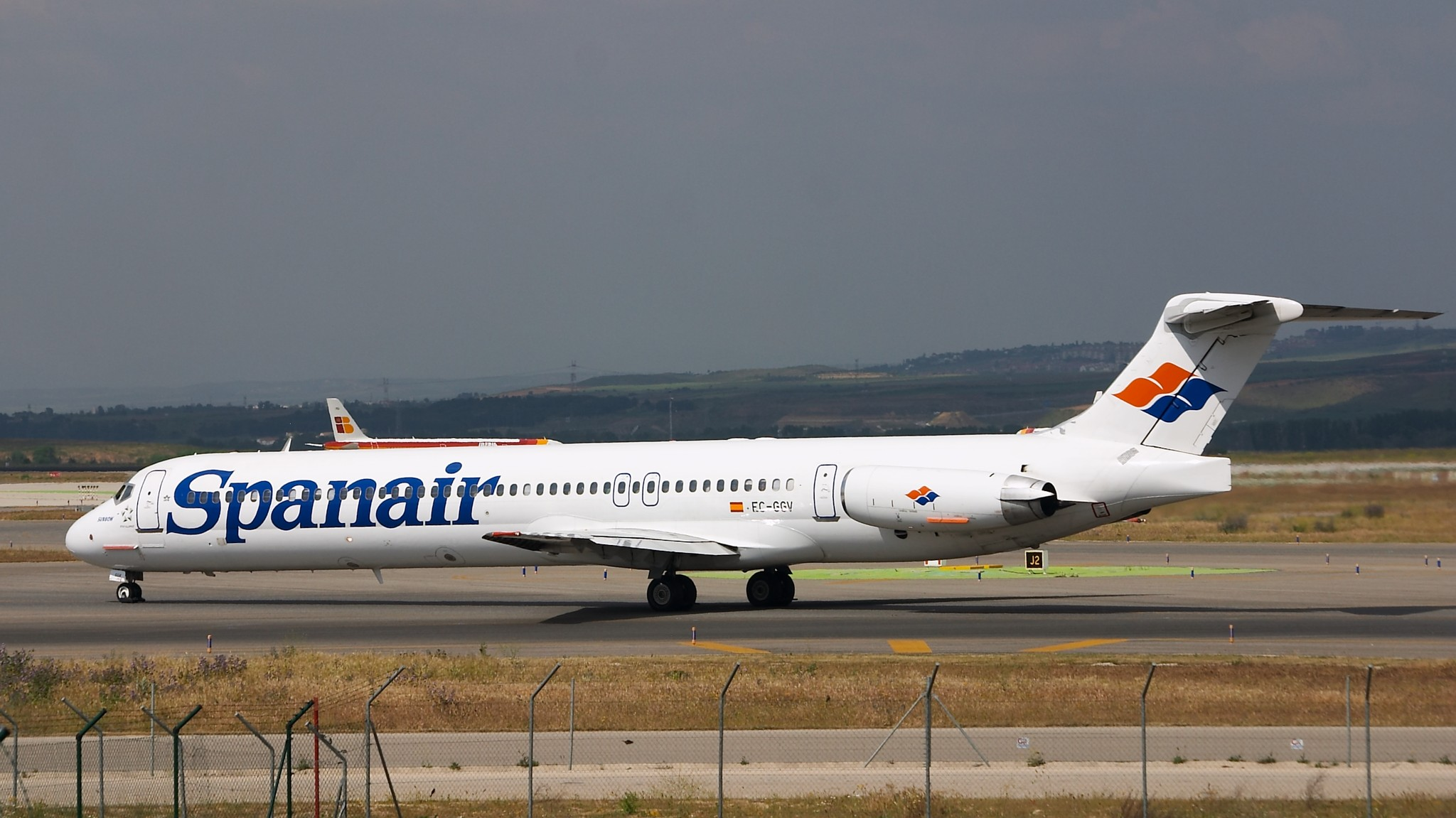 McDonnell Douglas MD-83 de Spanair rodando para despegar. Aeropuerto de Madrid Barajas.